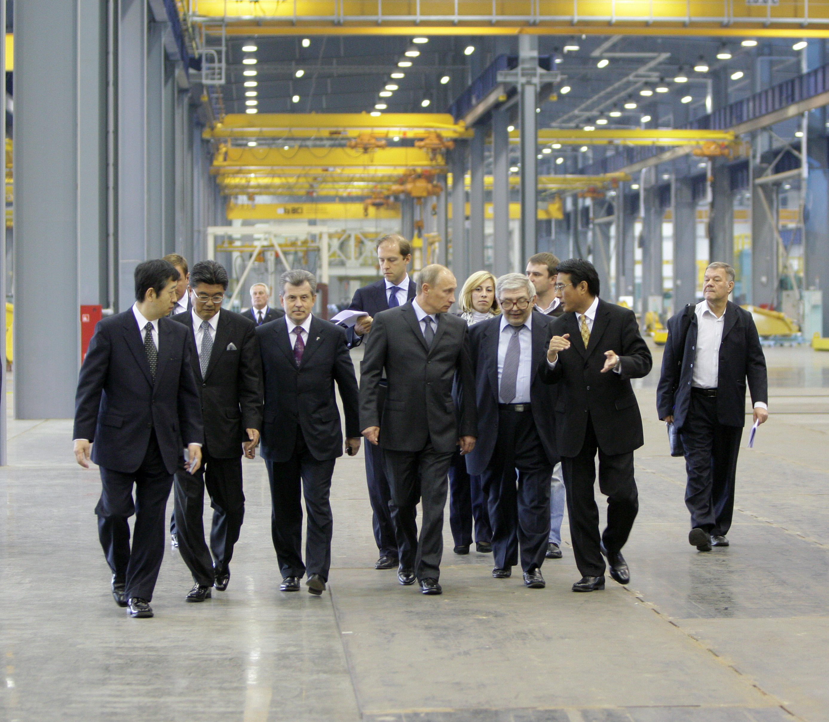 Председатель Правительства Российской Федерации В.В.Путин, находящийся в рабочей поездке по Ярославской области, посетил новый завод японской компании «Комацу» – мирового лидера по производству строительной техники